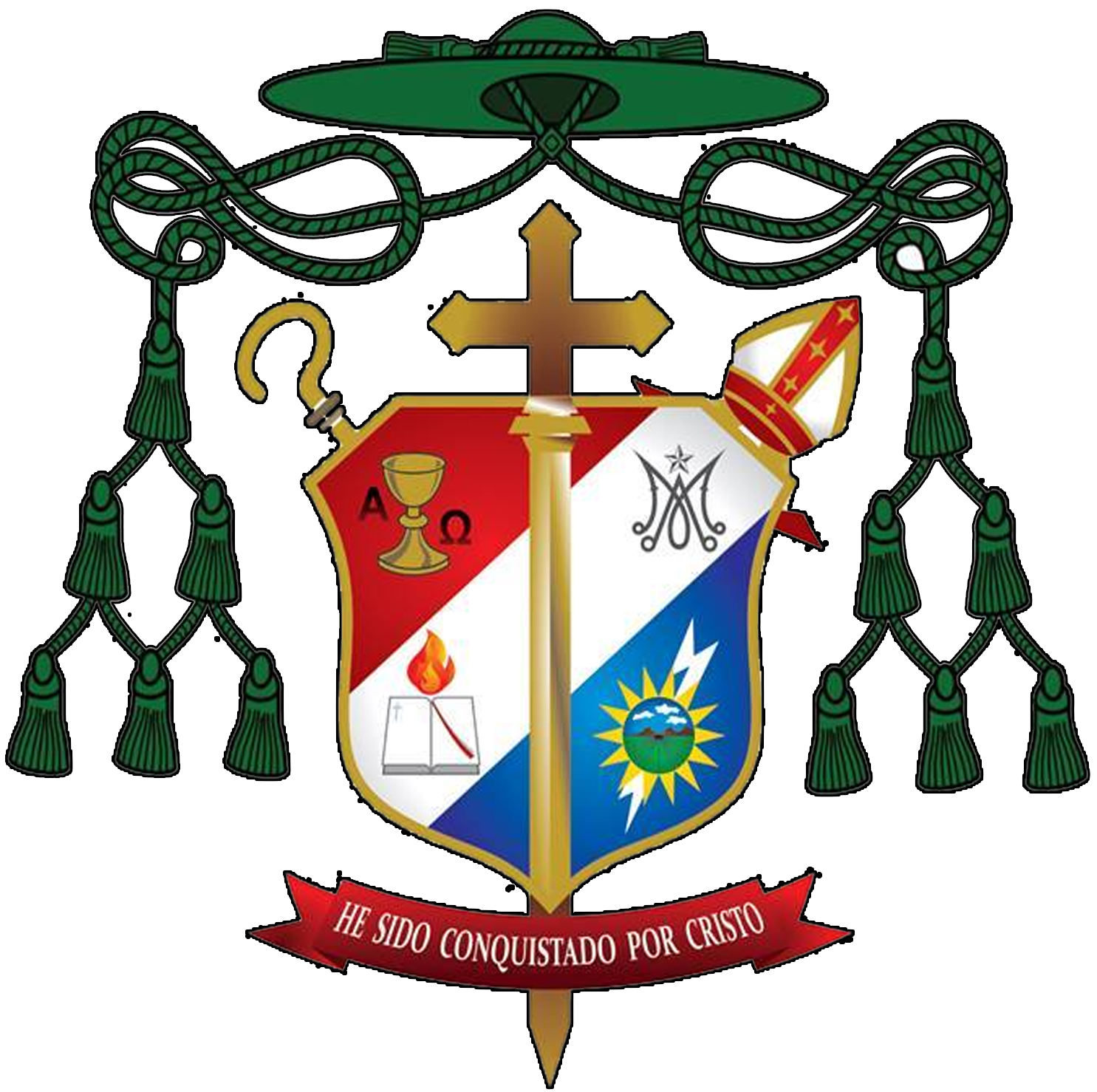 Escudo Episcopal de Monseñor Víctor Basabe obispo de San Felipe, Venezuela.